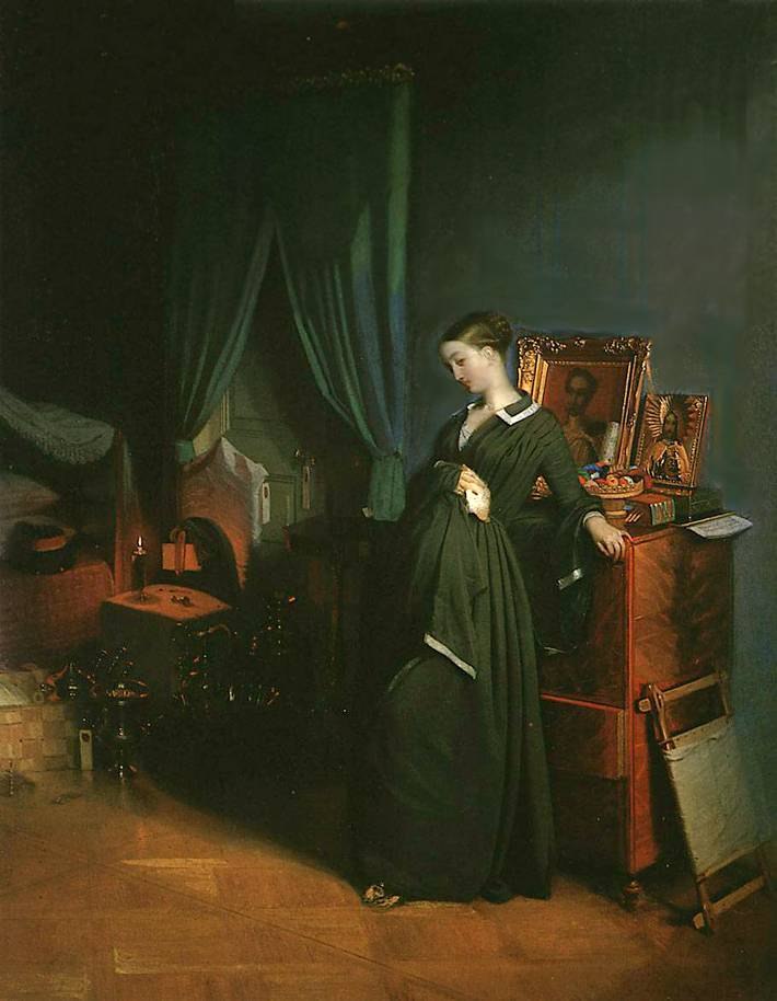 2nd version